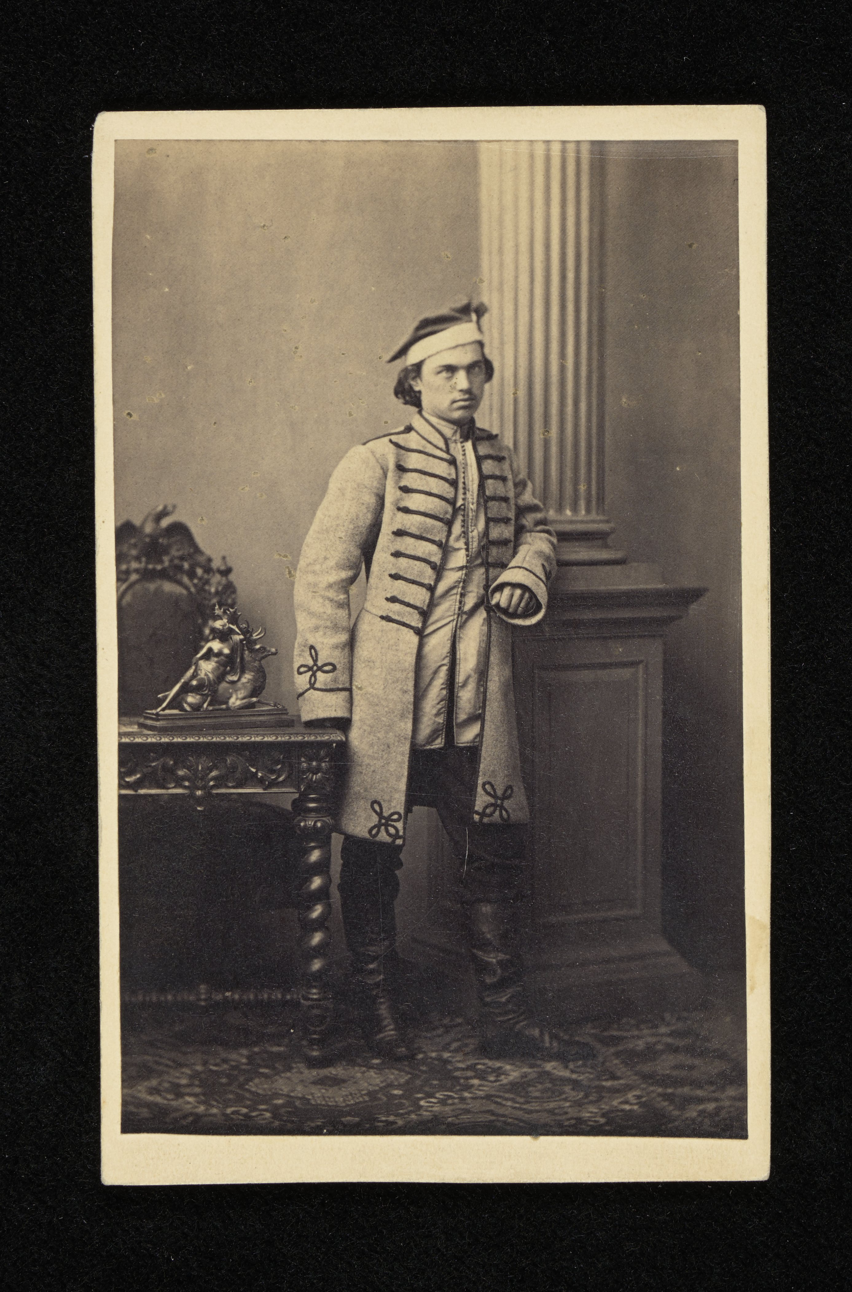 Stanisław Teofil Rybicki, ok. 1863 r.